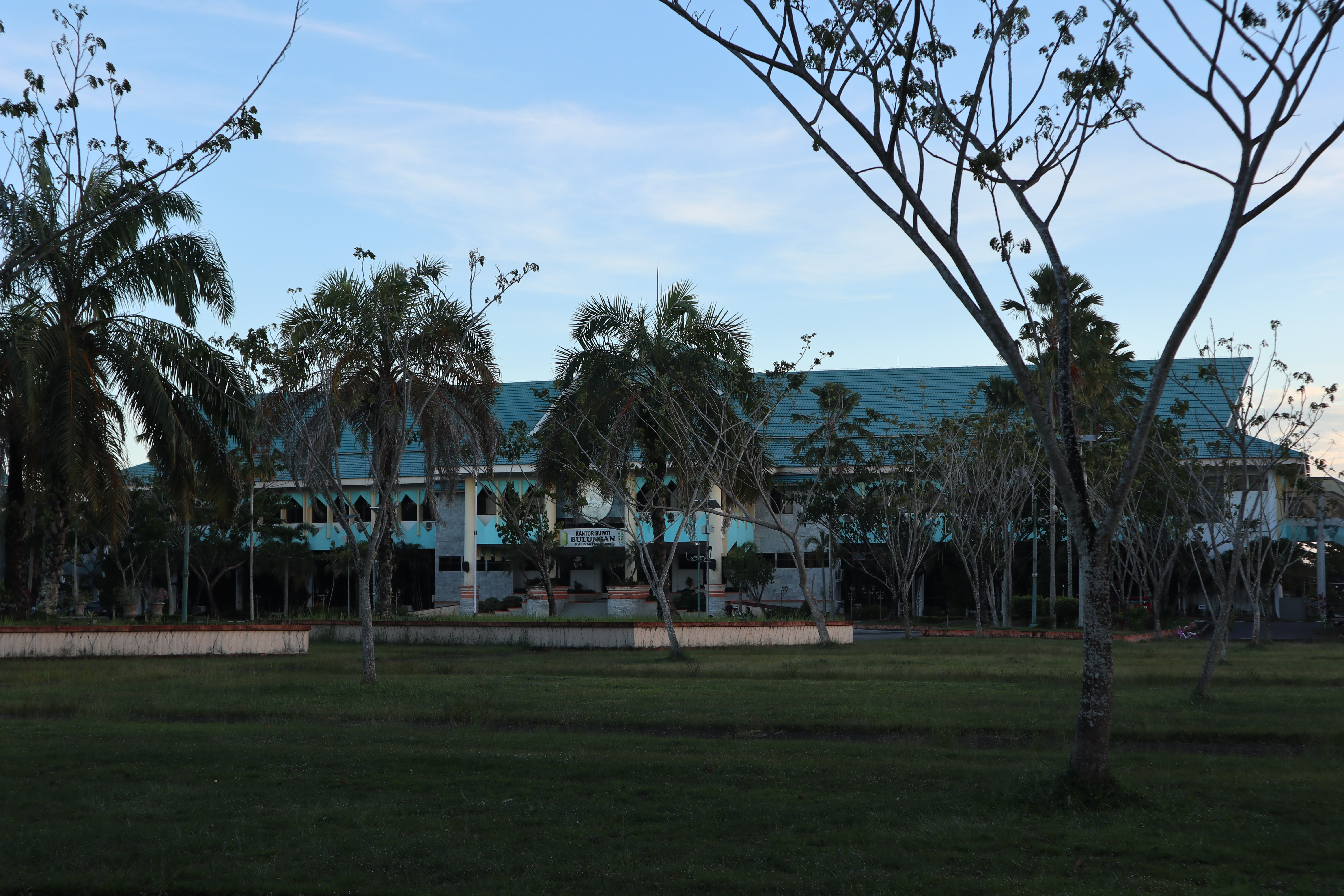 Kantor Bupati Bulungan di kota Tanjung Selor.